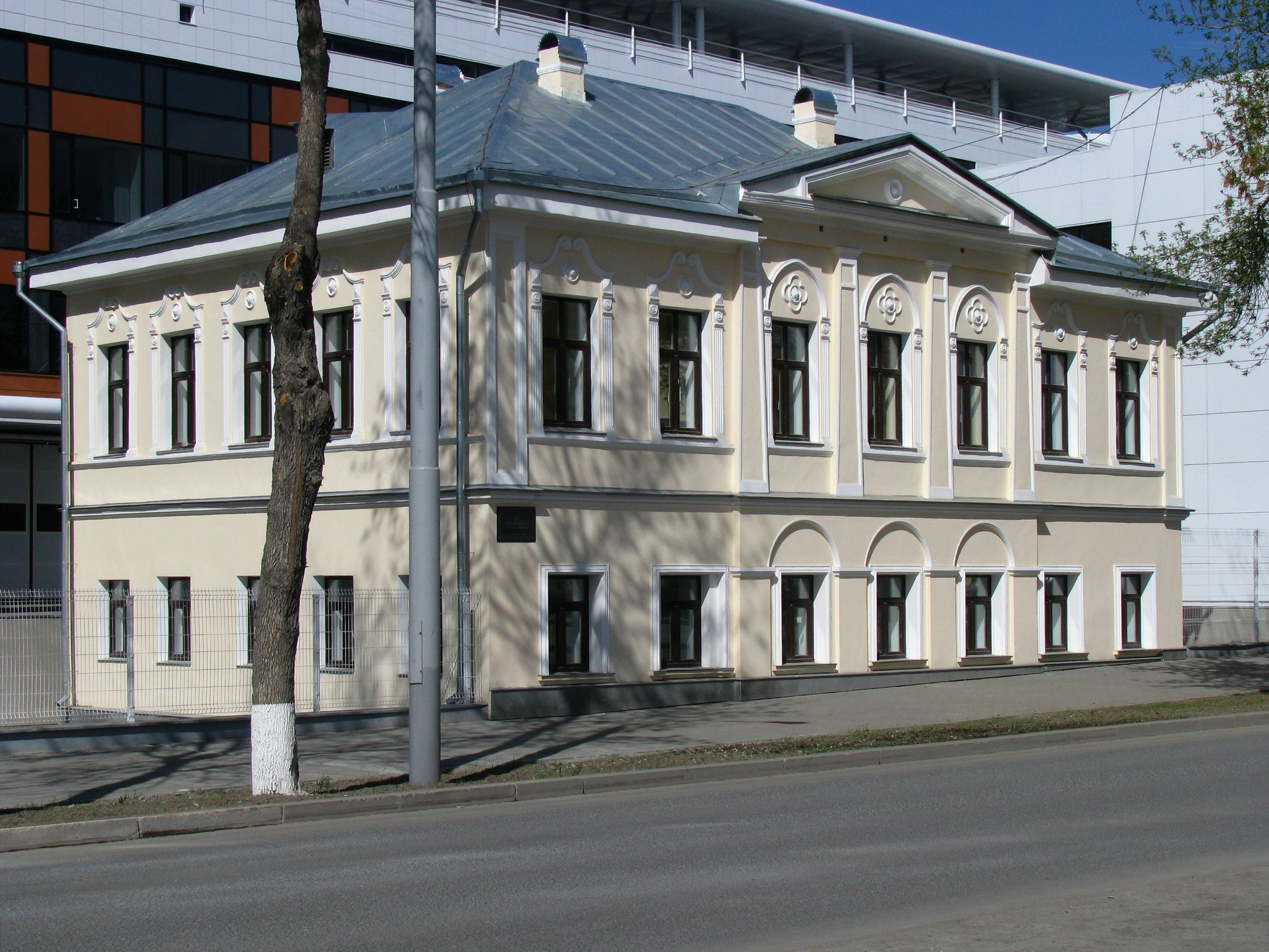 Дом У.О. Петелиной на ул. Добролюбова (бывш. Госпитальной) - образец городского особняка Екатеринбурга середины XIX века в стиле позднего классицизма. В настоящее время в здании располагается Художественный музей Эрнста Неизвестного.